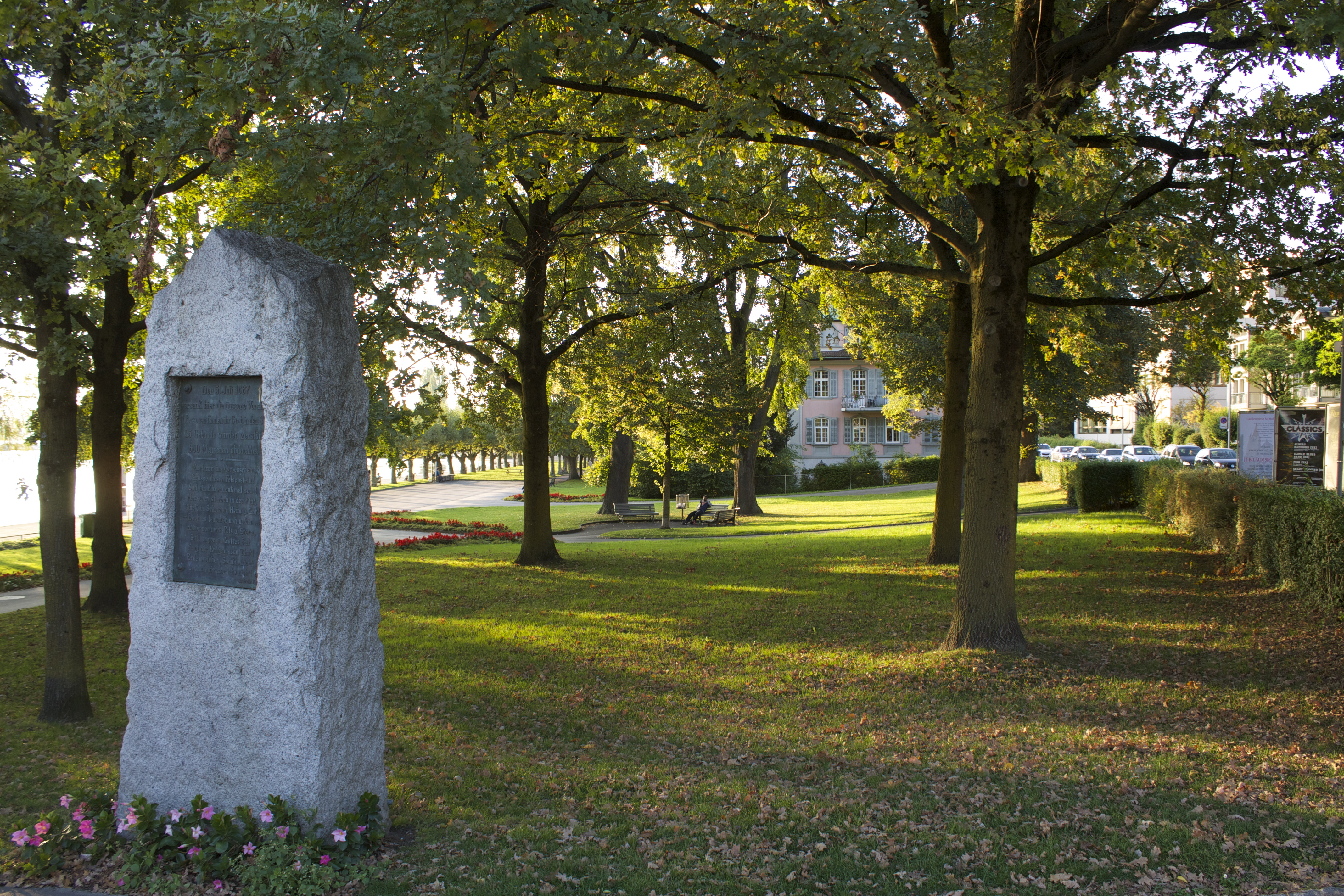 Zug